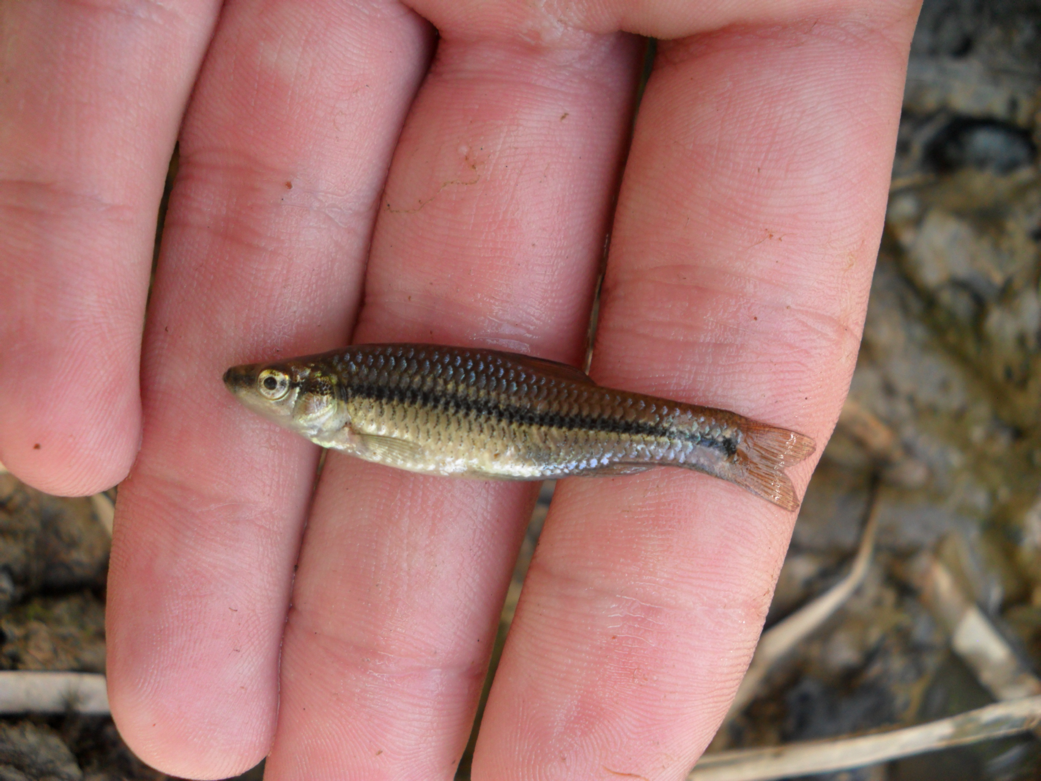 czebaczek amurski z okolic Oławy